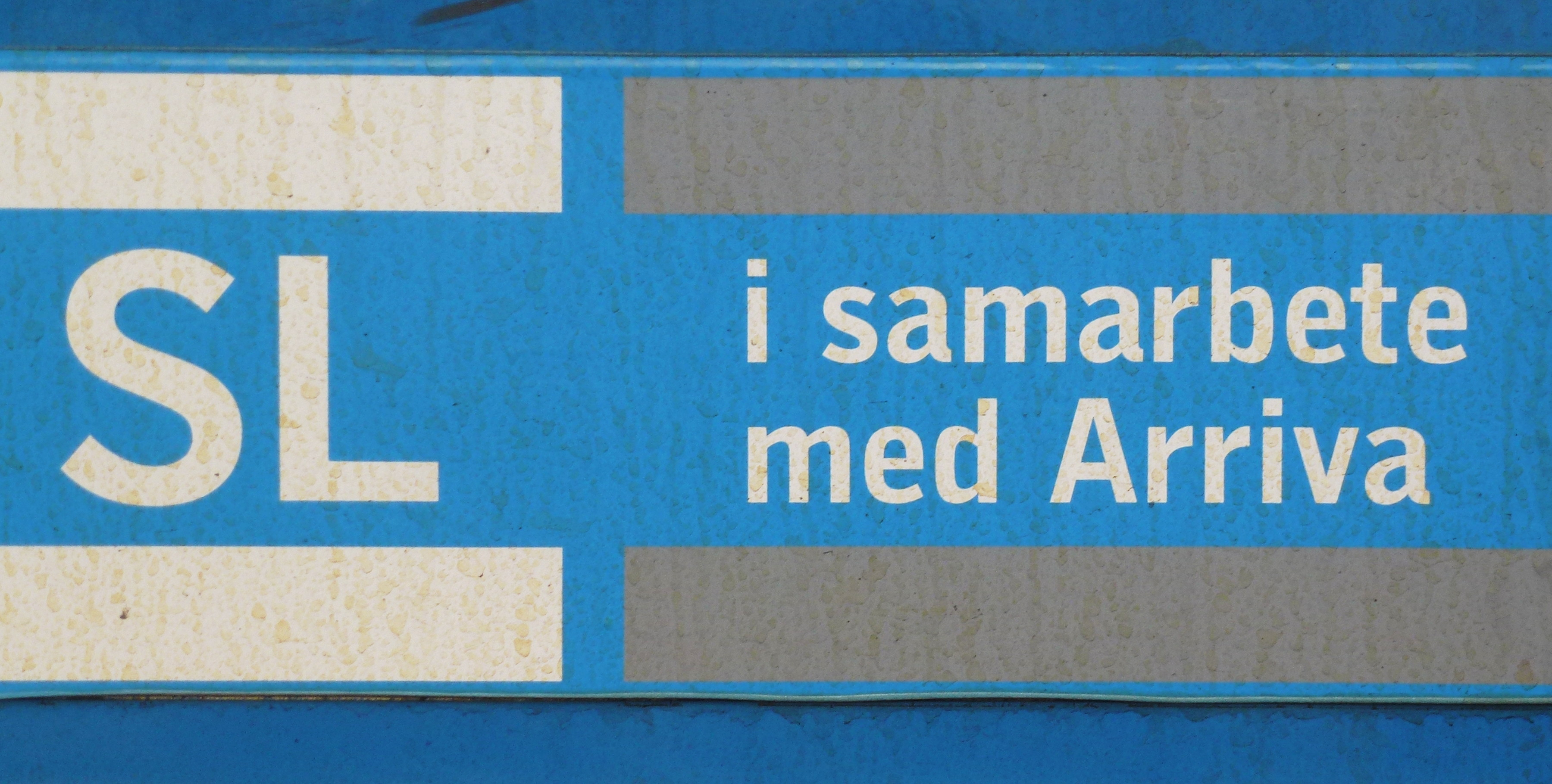 Saltsjöbanan SL och Arriva